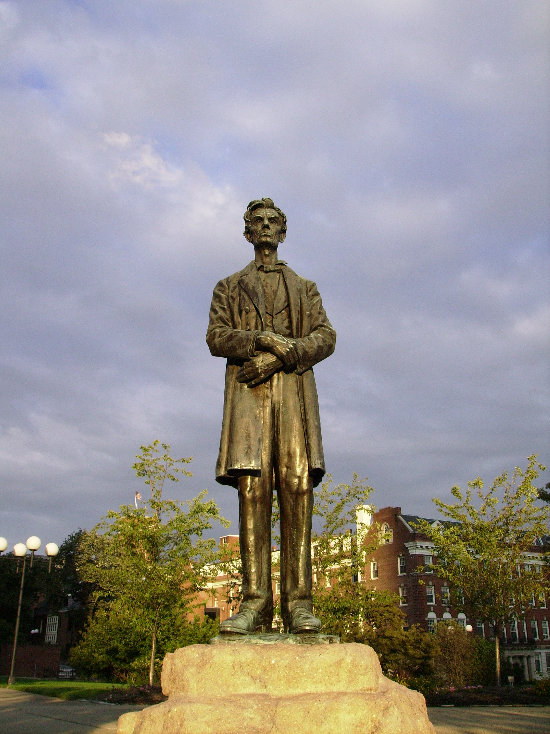 Abraham Lincoln Monument, Cincinnati OH